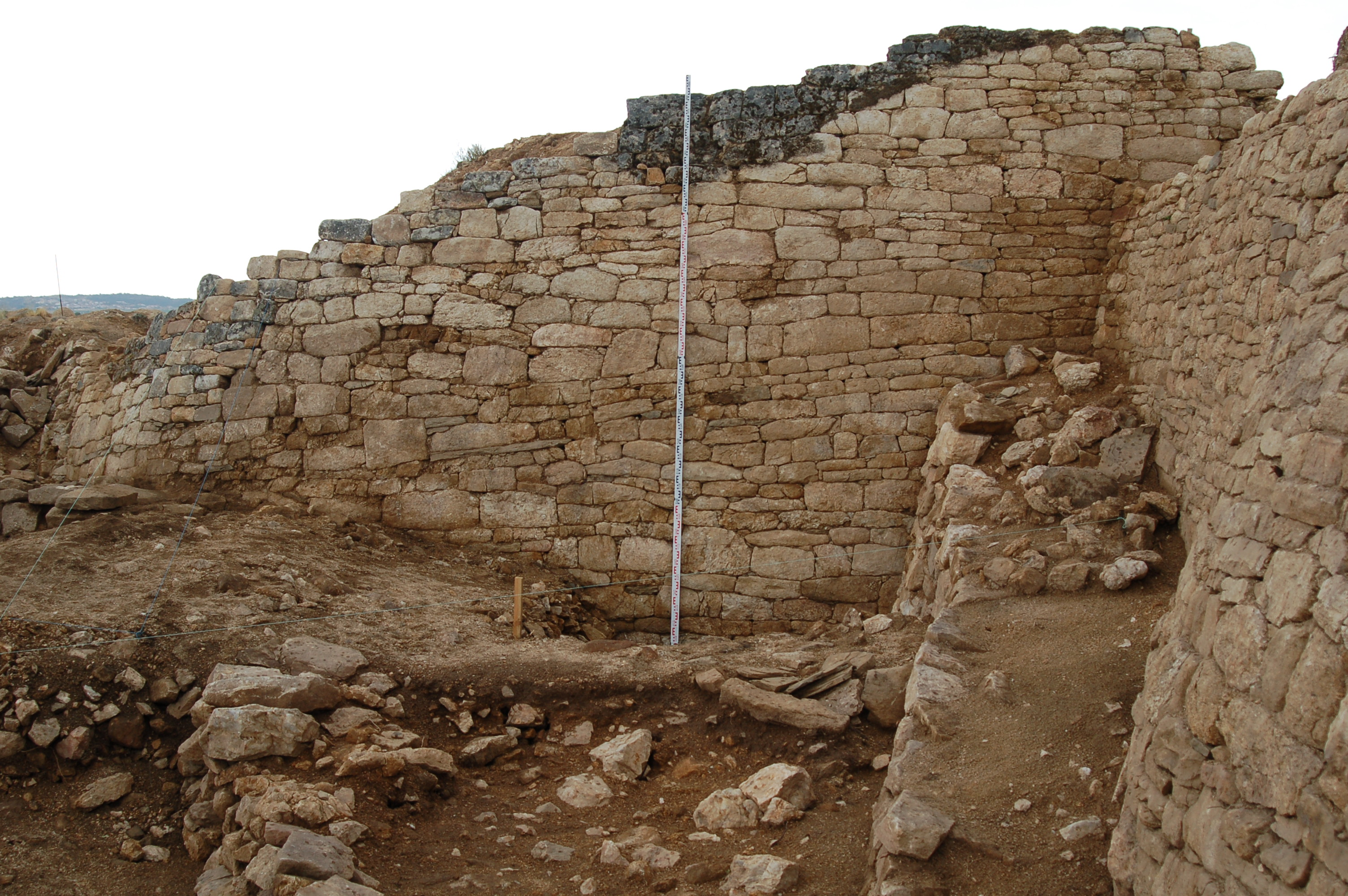 Estruturas Defensivas